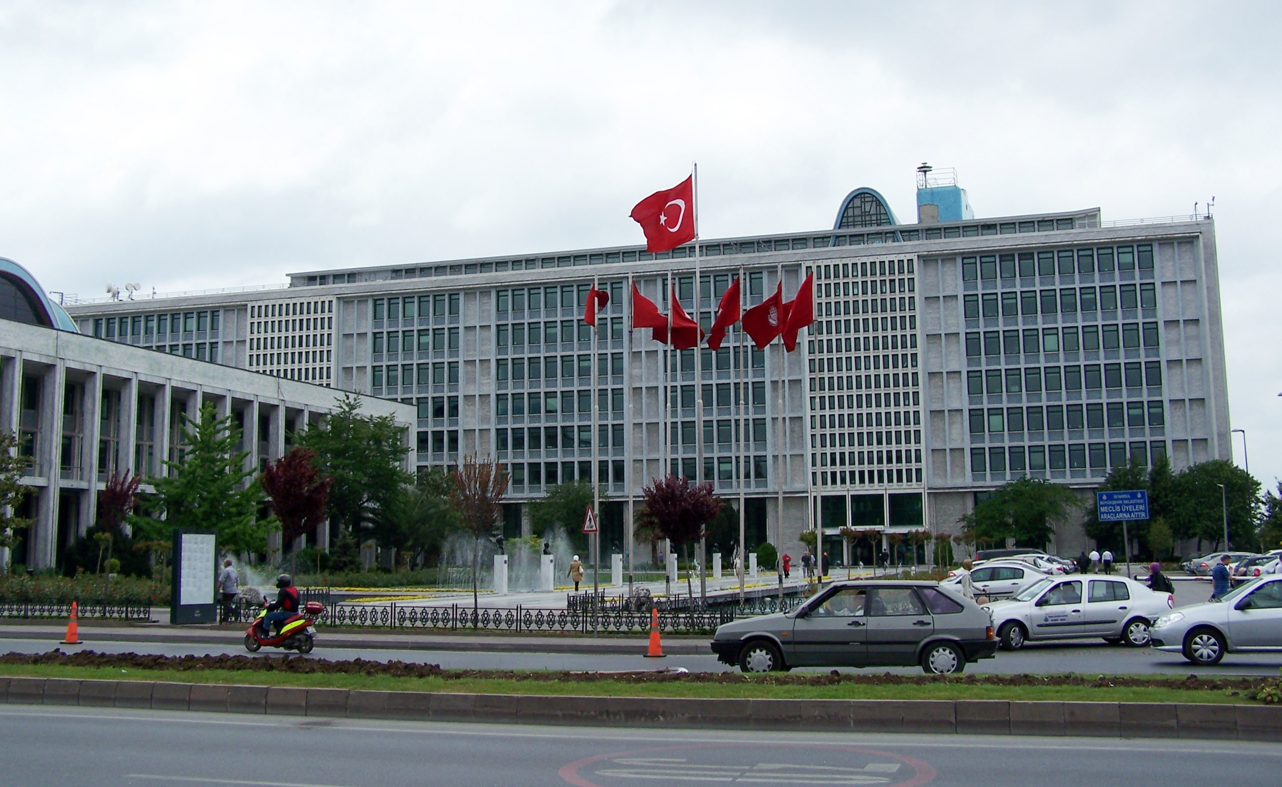 İstanbul Büyükşehir Belediyesi Bakanlığı (Istanbul Metropolitan Municipality office) in Fatih, İstanbul, Turkey